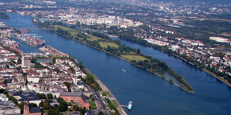 Luftbild Wiesbadener AKK-Vorort Amöneburg am Rhein Petersaue Foto 2008 Wolfgang Pehlemann Wiesbaden IMG_0090